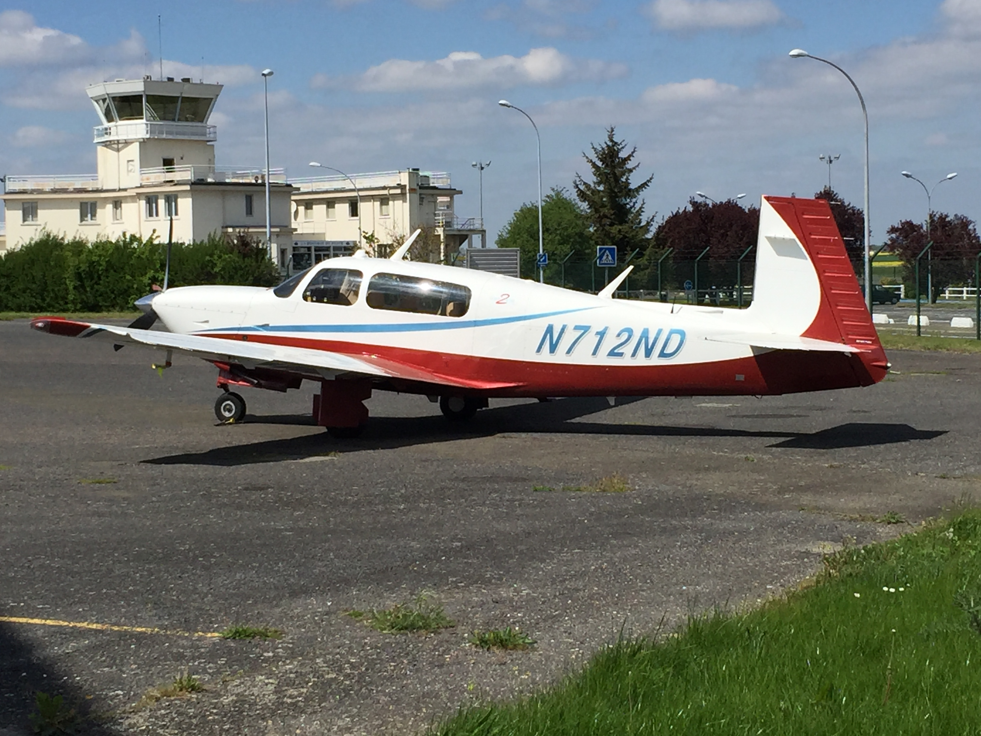 Mooney M20R Ovation2 à Toussus